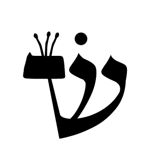 Lettre Shin avec diacritique